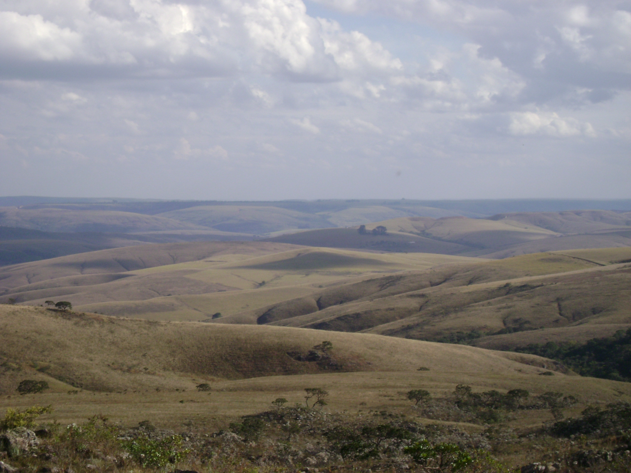 Mares de Morros em Araxá, Minas Gerais, Brasil, visto do lugar denominado Horizonte Perdido.